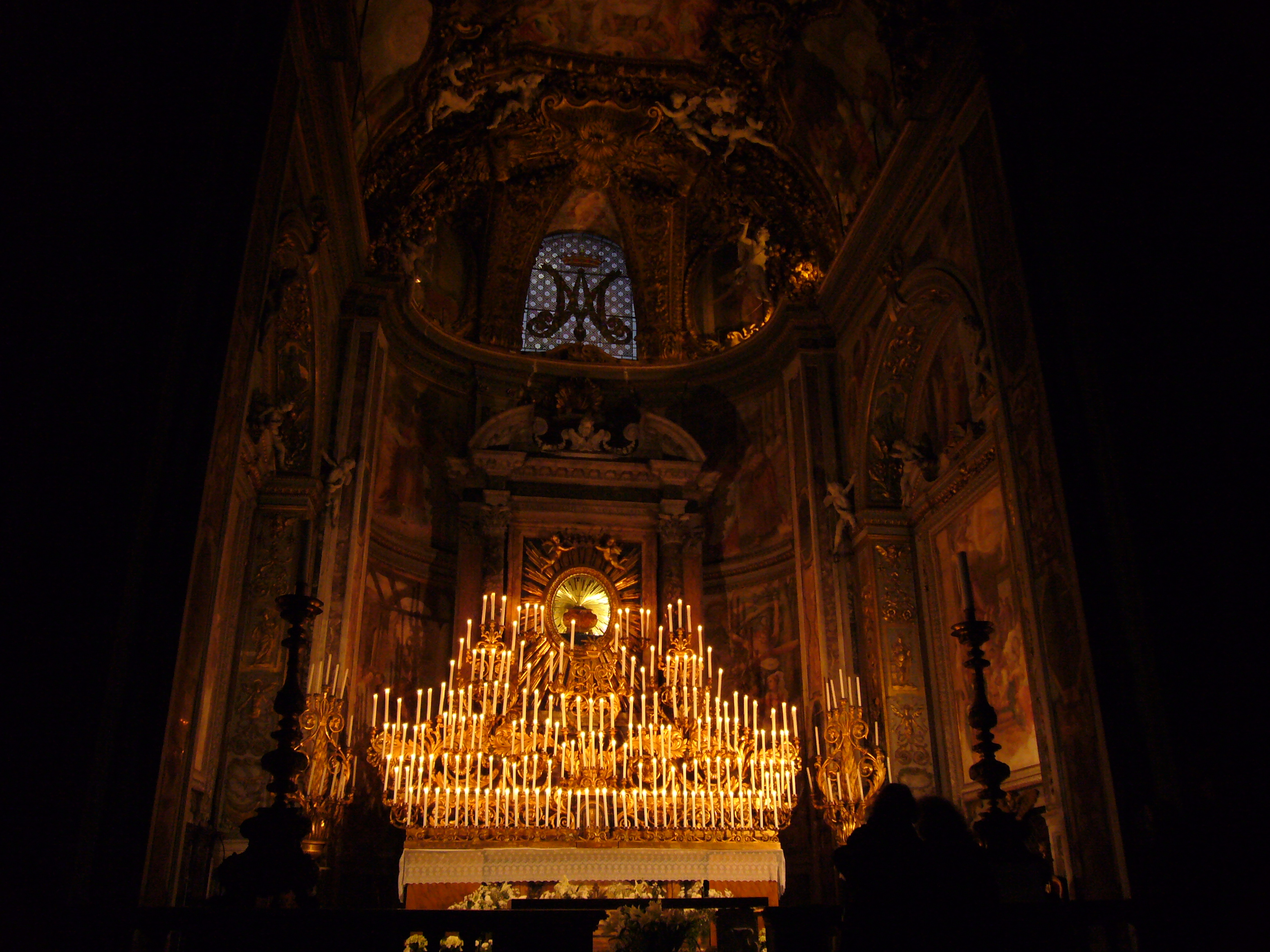 Roma, Santa Maria dell'Orto a Trastevere: macchina delle Quarant'ore per il Giovedì santo